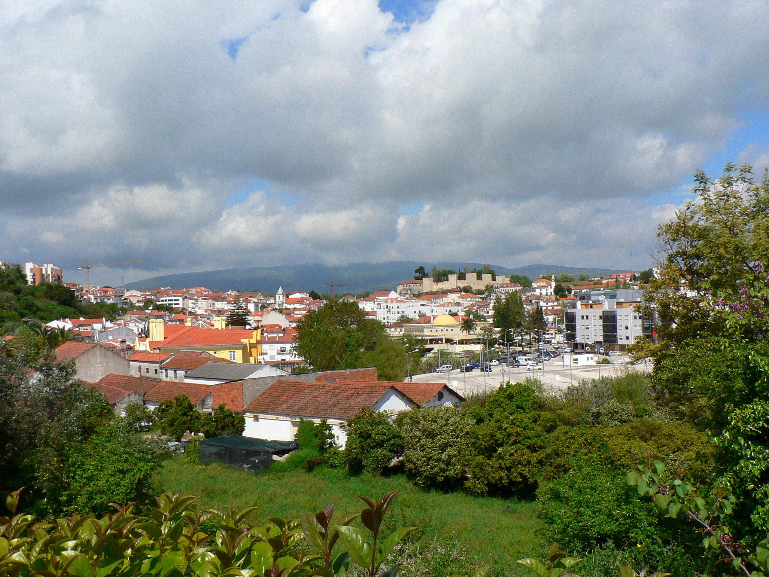 Vista geral de Torres Novas (ao fundo o castelo da cidade e a Serra de Aire)